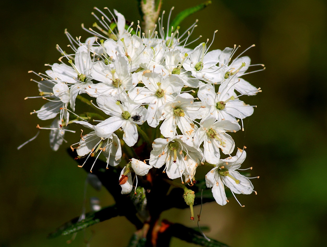 Sumpfporst an der Müritz